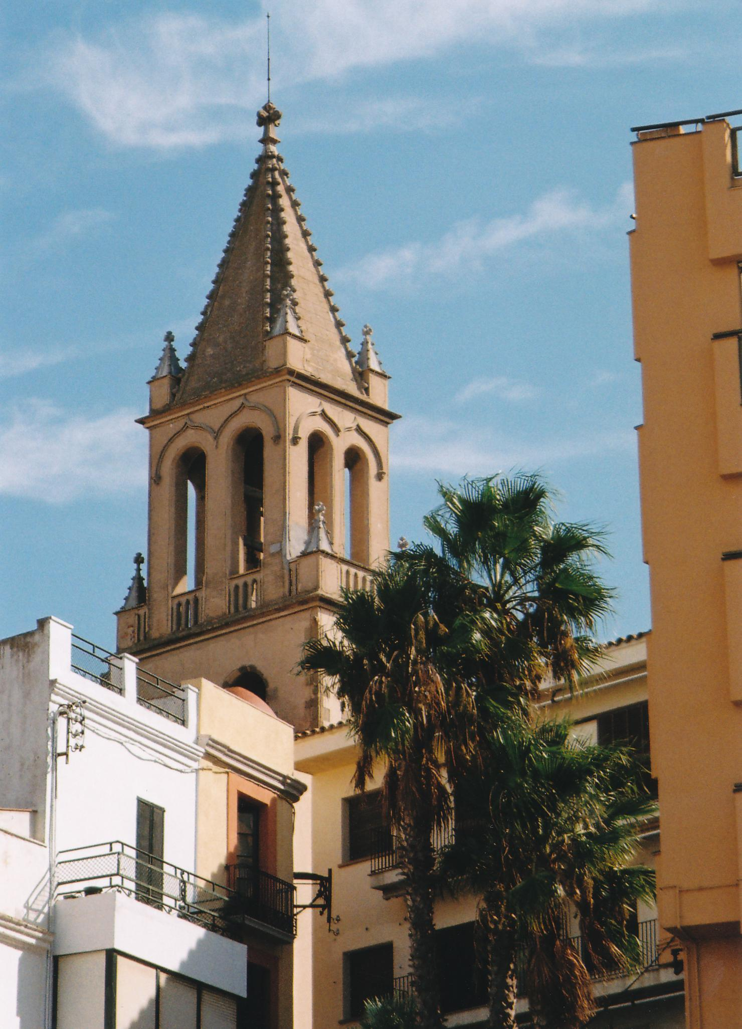 Palamós - Esglèsia Santa Maria del Mar Datum: 09/2009 Urheber: Michael Pfeiffer Quelle: privates Fotoalbum des Urhebers